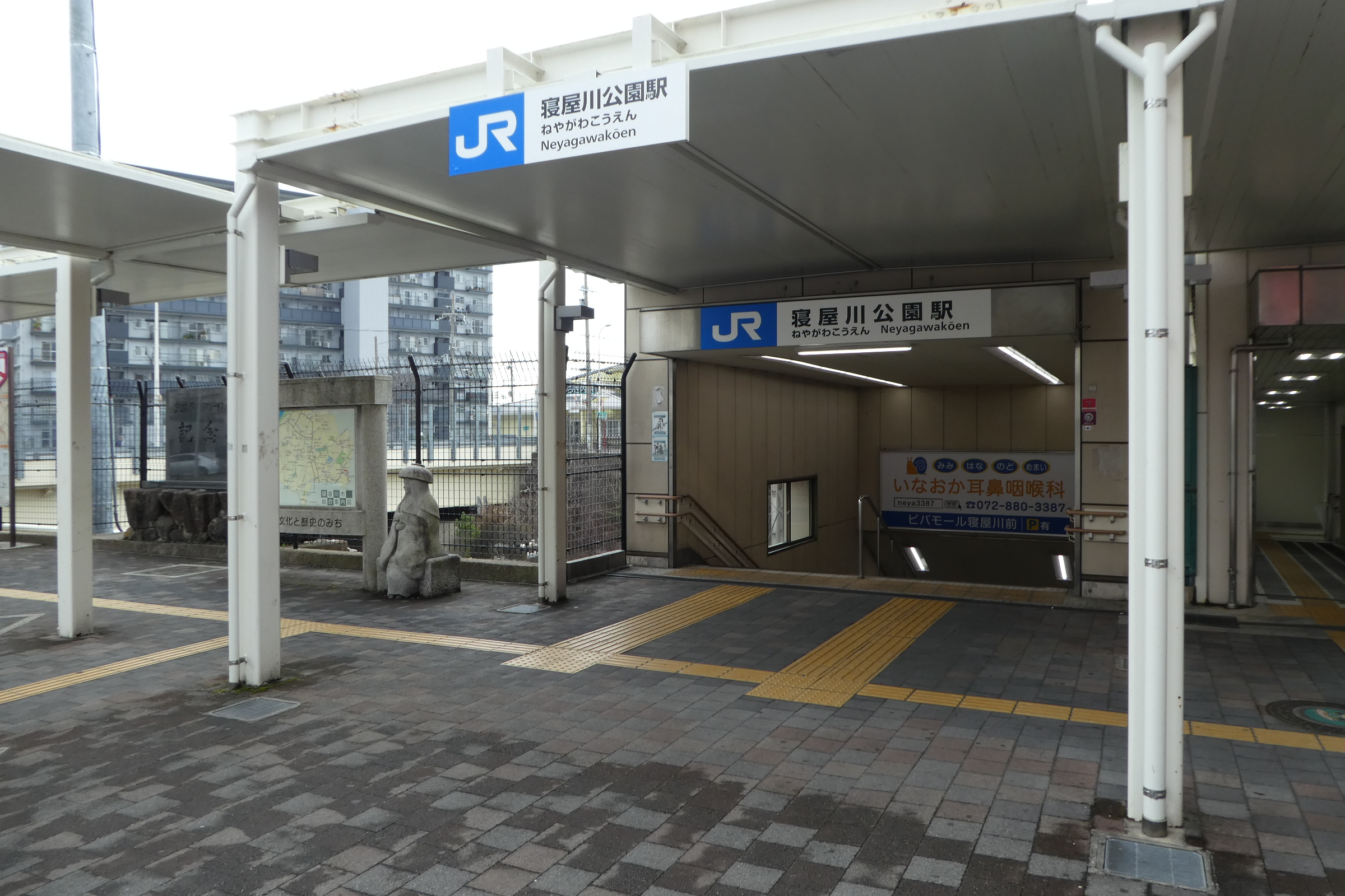 寝屋川公園駅東口。